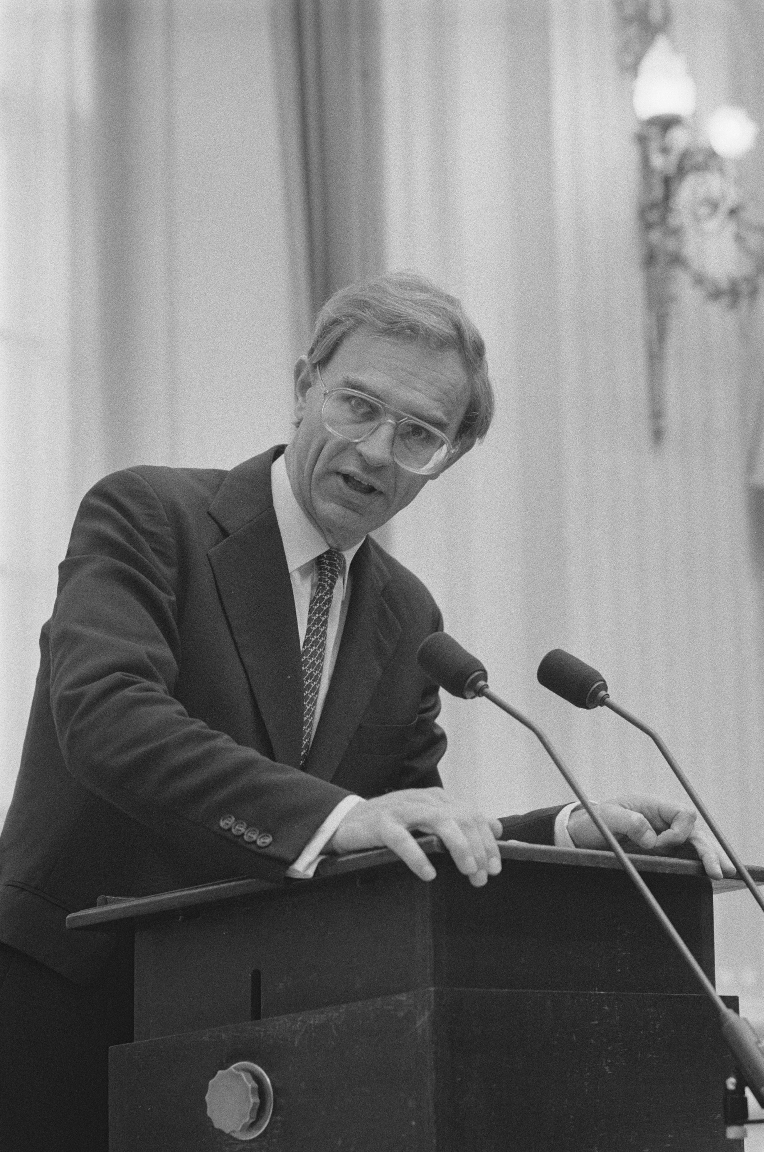 Collectie / Archief : Fotocollectie Anefo Reportage / Serie : [ onbekend ] Beschrijving : Tweede Kamer voorjaarsnota; minister Ruding tijdens zijn antwoord Datum : 1 juli 1987 Trefwoorden : politiek Persoonsnaam : Ruding, Onno Fotograaf : Fotograaf Onbekend / Anefo Auteursrechthebbende : Nationaal Archief Materiaalsoort : Negatief (zwart/wit) Nummer archiefinventaris : bekijk toegang 2.24.01.05 Bestanddeelnummer : 934-0254